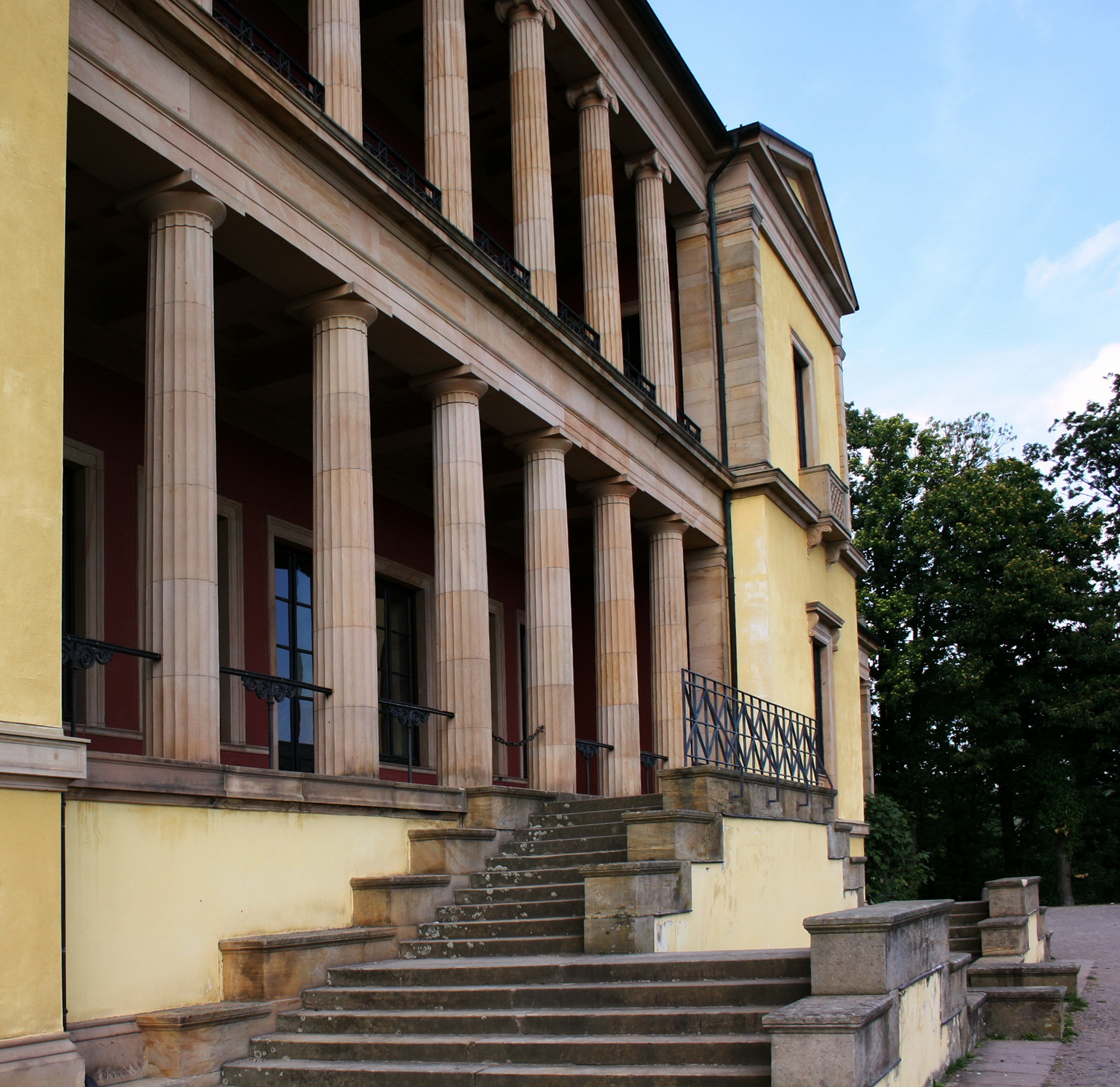 Villa Ludwigshöhe